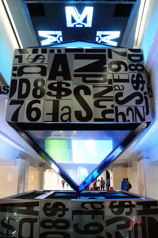 中文（中国大陆）: 武汉地铁2号线